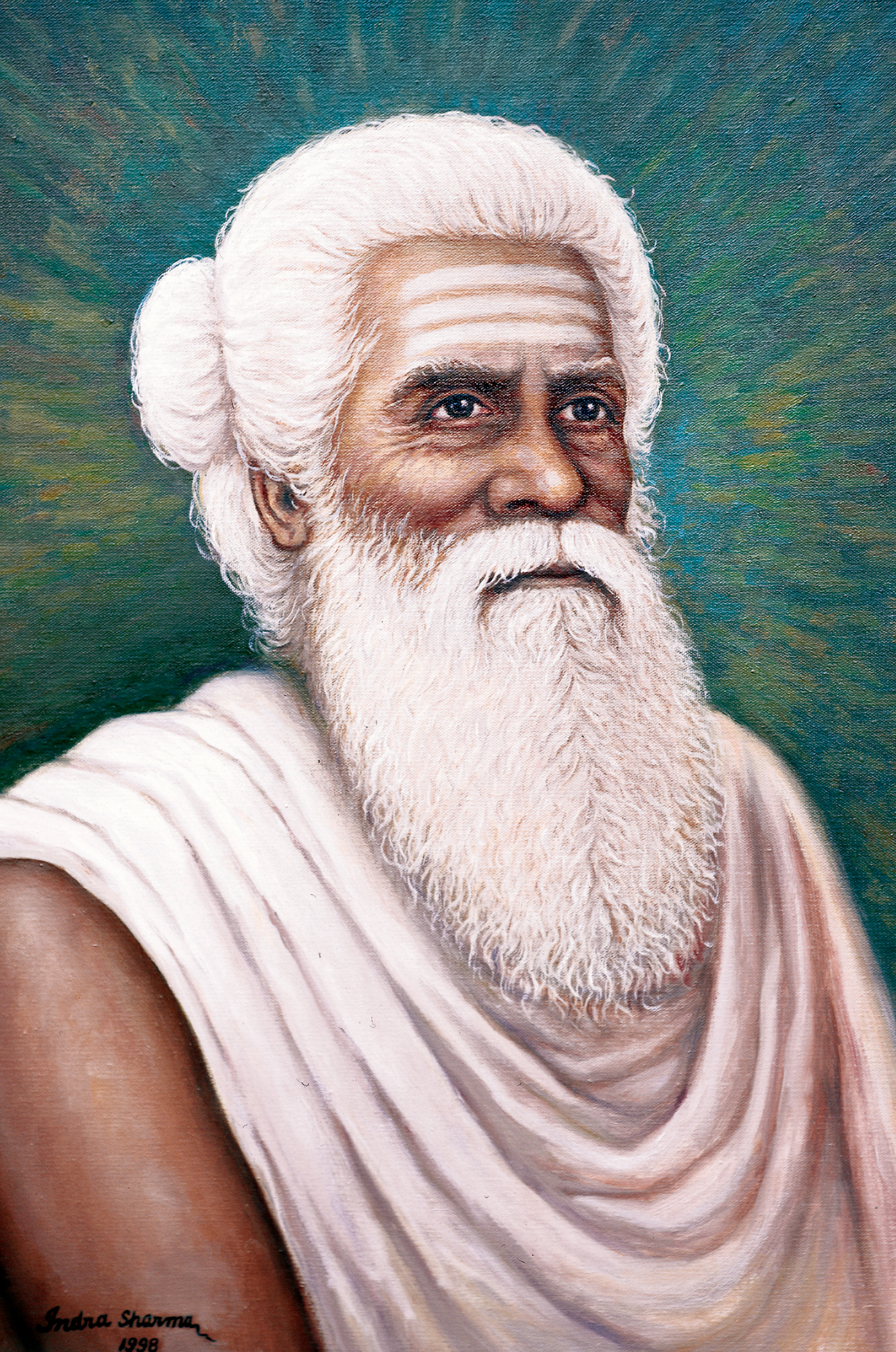 Yogaswami